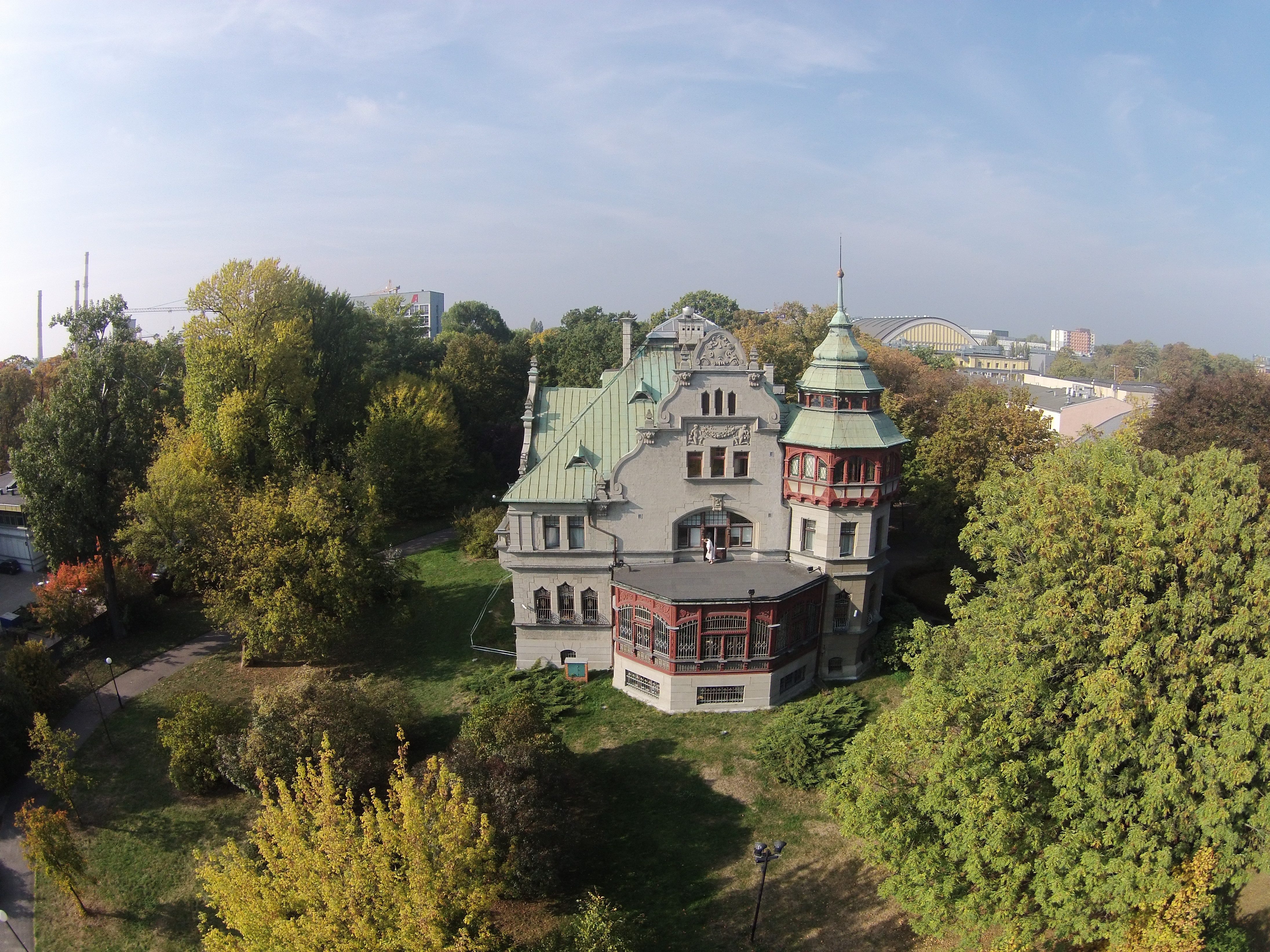 Park Klepacza Łódź - Willa Reinholda Richtera (juniora)